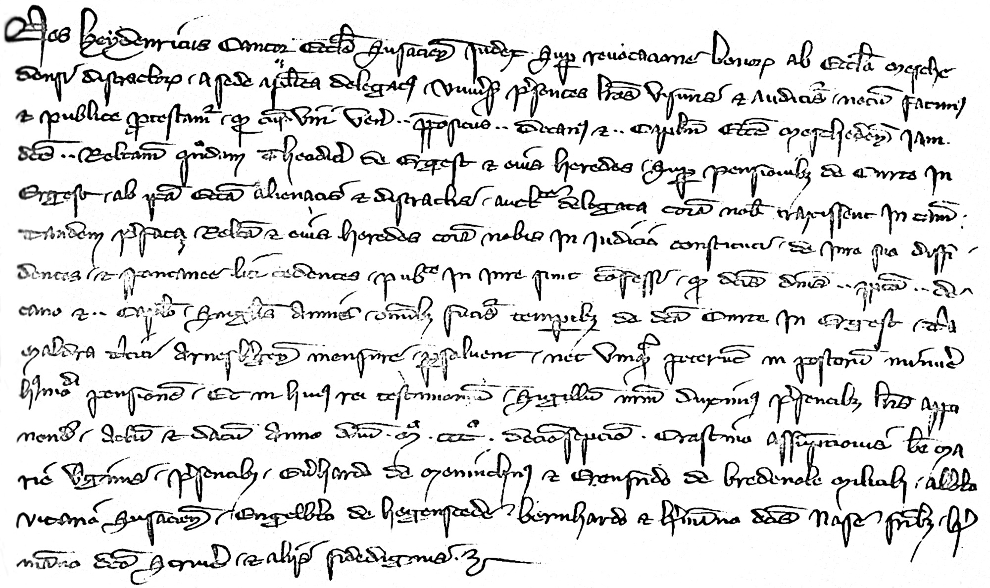 Urkunde zu Ergste von 1317 Übertragung ins Hochdeutsche: 16. August 1317 „Wir Heydenreich, Kantor der Soester Kirche und delegierter Richter des apostolischen Stuhles für die Rückgewinnung der dem Stift Meschede entzogenen Güter, tun allen, die diese Urkunde lesen und hören, kund und erklären öffentlich: Als die ehrwürdigen Männer, Propst, Dekan und Kapitel des genannten Stiftes Meschede, die Witwe des Dietrich von Ergeste und ihre Erben über Leistungen aus dem Oberhof in Ergeste, die dem erwähnten Mescheder Stift entfremdet und entzogen waren, kraft delegierter Befugnis vor uns in einen Prozeß gezogen hatten, bekannten schließlich die erwähnte Witwe und ihre Erben öffentlich vor uns im Gericht, da sie ihrem Rechtstitel nicht trauten, indem sie dem Streit freiwillig entsagten, dass sie den genannten Herren, Propst, Dekan und Kapitel, für alle Zukunft jährlich von dem genannten Oberhof in Ergeste 3 Malter Weizen Arnsberger Maßes zahlen werden und diese Zahlung in Zukunft niemals mindern könnten. Zum Zeugnis dessen haben wir geglaubt, unser Siegel dieser Urkunde anhängen zu müssen. Geschehen und gegeben im Jahre 1317 am Tage nach Mariae Himmelfahrt in Gegenwart der Ritter Everhard von Meiningsen und Erenfried von Bredenohl, des Vikars Albert in Soest, des Engelbert von Hegenscheid, der Brüder Bernhard und Hermann Nase, des Hermann Schreiber und anderer glaubwürdiger Leute." Später wurde auf der Pergamentrückseite vermerkt: In Ergest curtis (Oberhof) beirhoff.